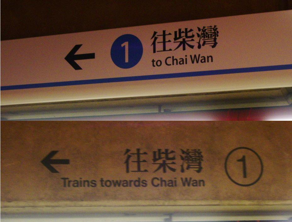 Heng Fa Chuen Station